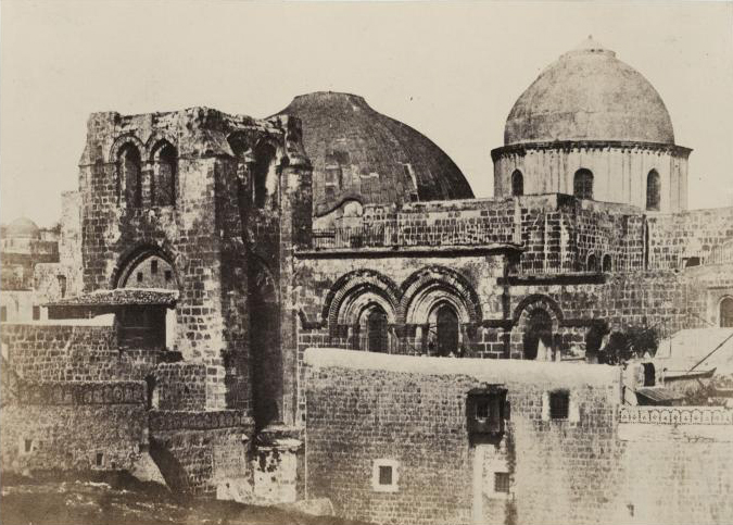 Saint Sépulcre, vue générale, Jerusalem.